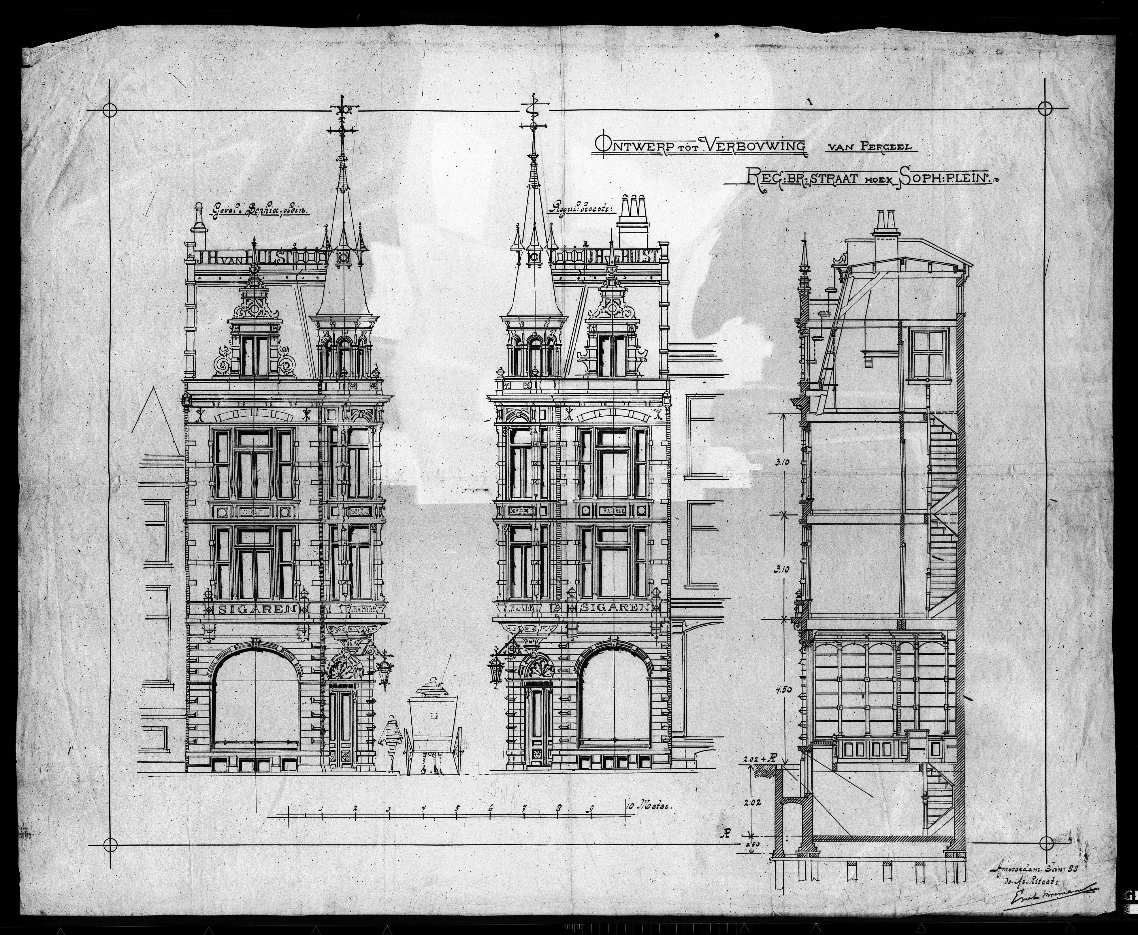 Beschrijving: Ontwerp tot verbouwing van het perceel gevels Muntplein en Reguliersbreestraat/doorsnede Documenttype: bouwtekening Vervaardiger: Breman, Evert (1859-1926) Collectie: Collectie Stadsarchief Amsterdam: bouwtekeningen Datering: januari 1888 Geografische naam: Reguliersbreestraat Muntplein Gebouw Munttoren Inventarissen: Afbeeldingsbestand: 010056917731